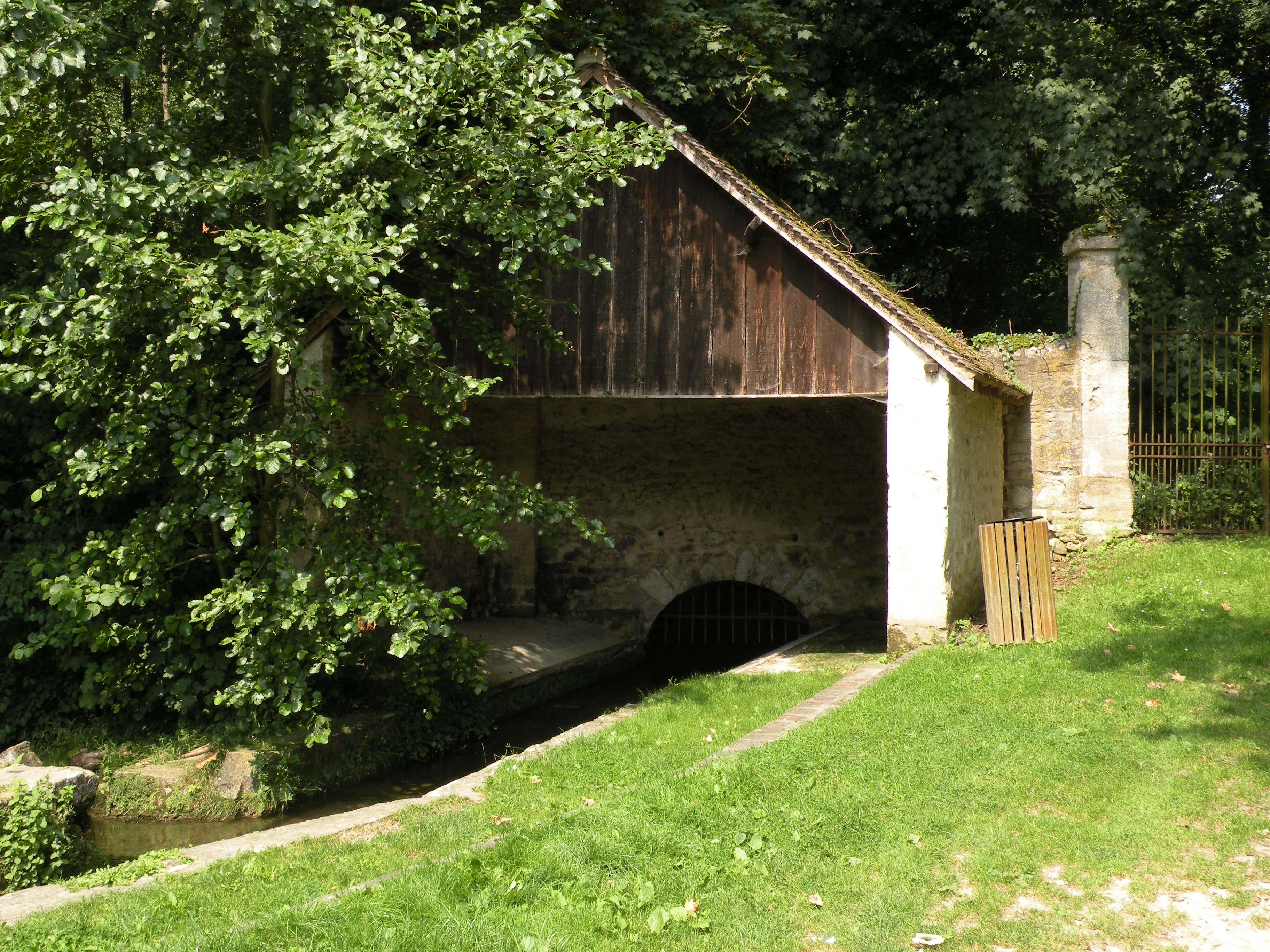 ruissaux qui alimente l'étang de Menouville, val d'oise, france